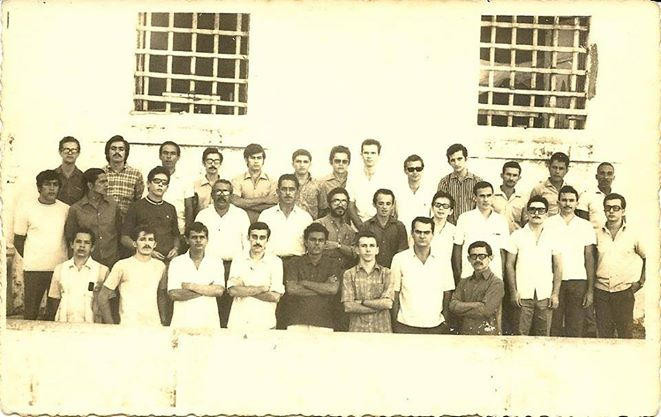 Arquivo resgatado pela Comissão Nacional da Verdade do Estado de São Paulo. Depicted person: Zoé Lucas de Brito Filho